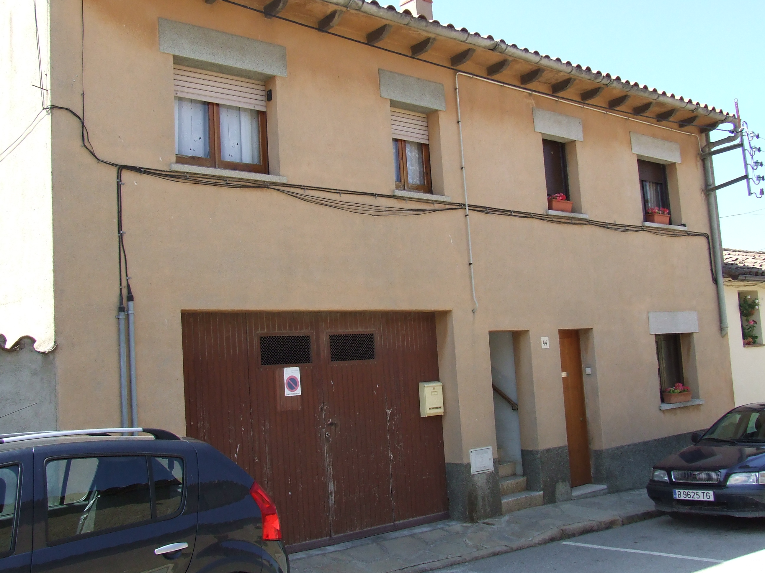 Cal Carreter nou (Castellcir, Moianès)